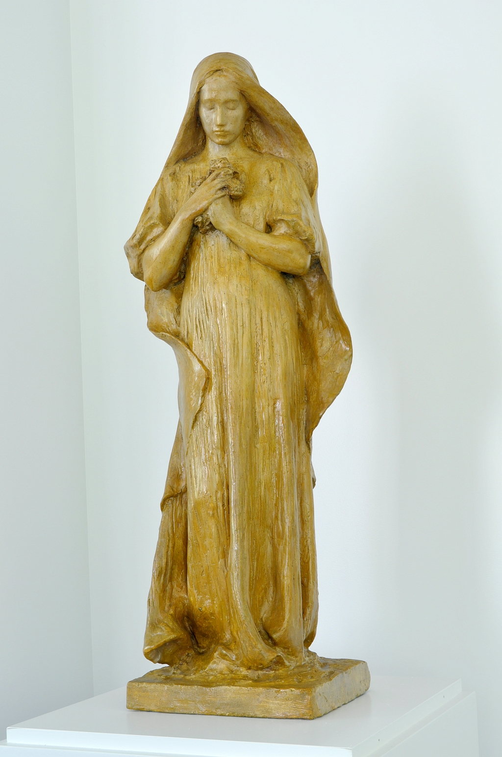 La Virtut Josep Llimona